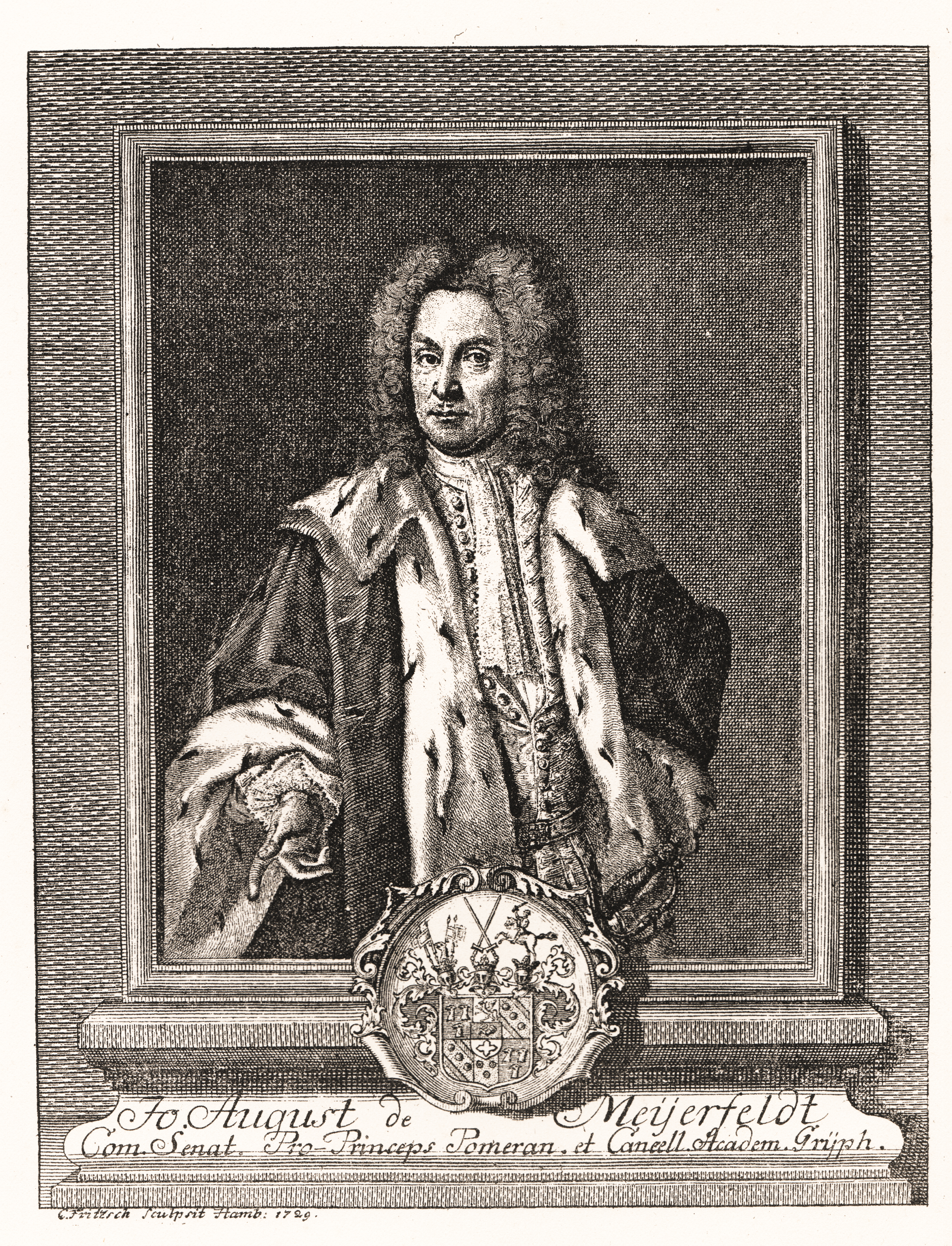 Johan August Meijerfeldt den äldre (1664-1749). Öfver honom finnas flere graverade bilder, däribland ett anonymt svartkonstblad. Det här afbildade sticket är utfördt af den bekante i Hamburg och tillhör en serie af 5 bilder af svenske riksråd, hvilka bilder tillhöra Chr. Nettelbladts: Schwedische Bibliothec. Af detta stick finnes en efterbildning, men utan vapen samt med olika inskription. Ännu en tydlig efterbildning af denna bild med rådshatt är signerad: Dan. Tilas ... I. L. Ekestubbe.